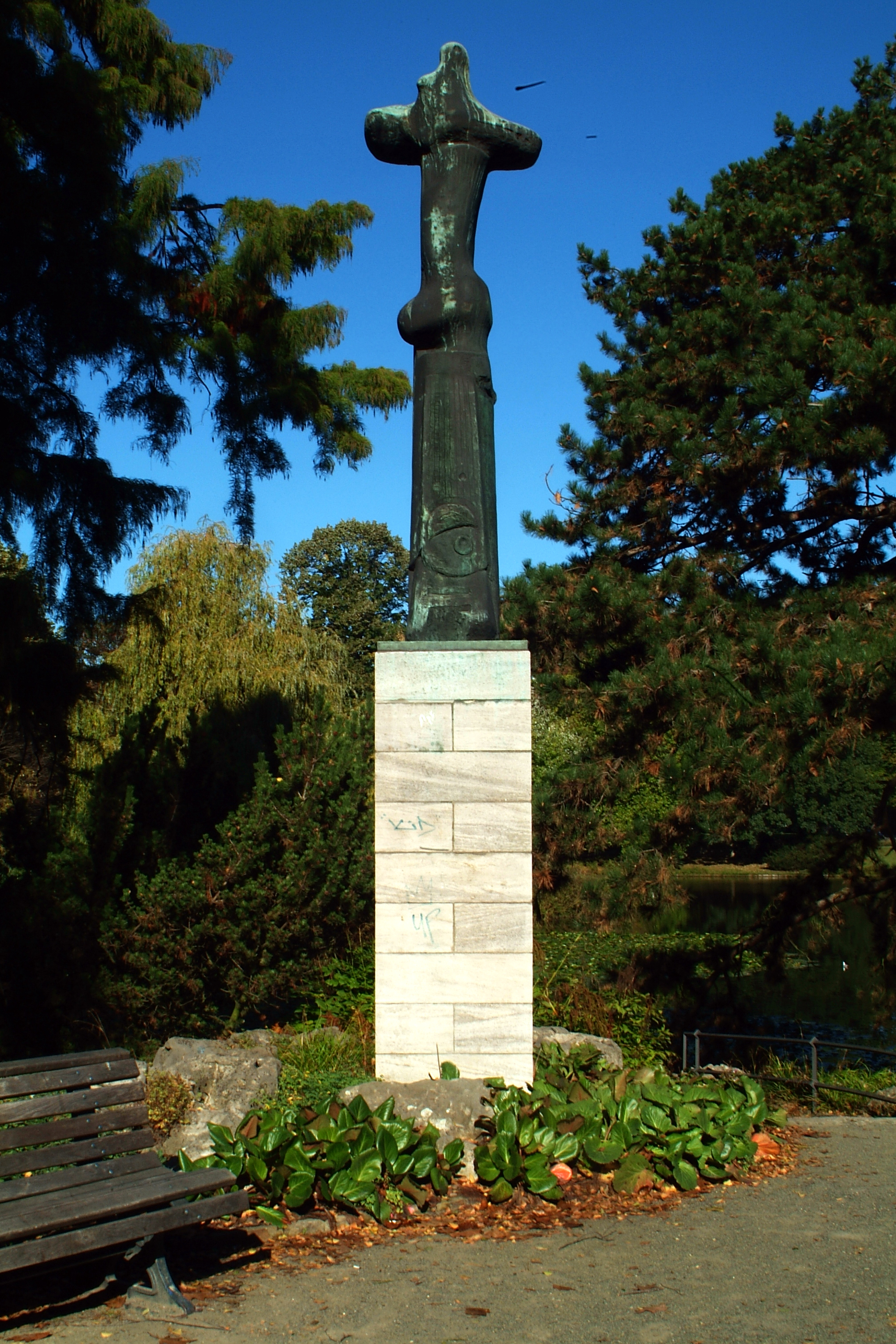 Das "Glenkiln Cross (dt.: Schottisches Kreuz) von Henry Moore auf seiner Säule im Maschpark.